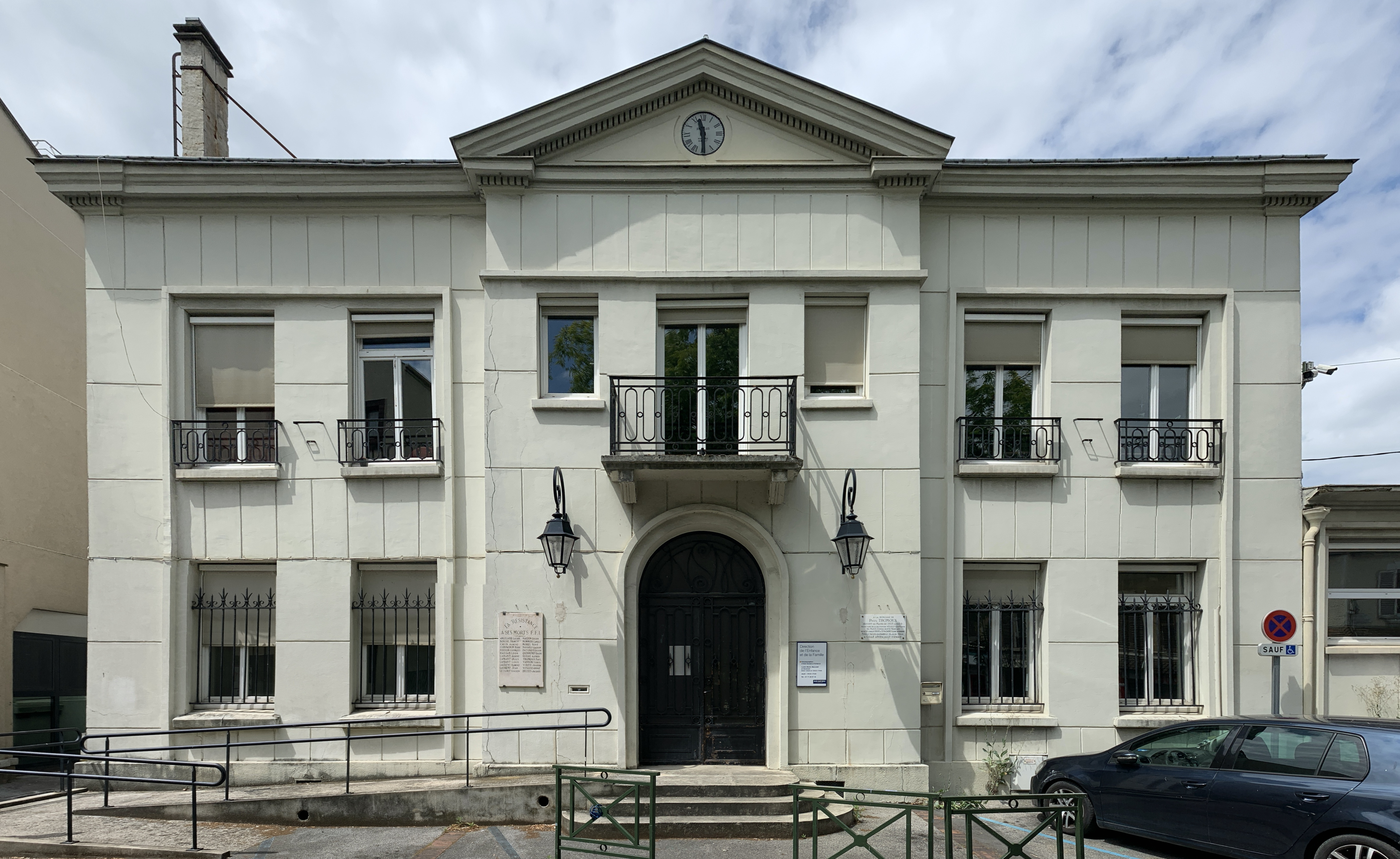 Ancien hôtel de ville de Neuilly-sur-Marne.